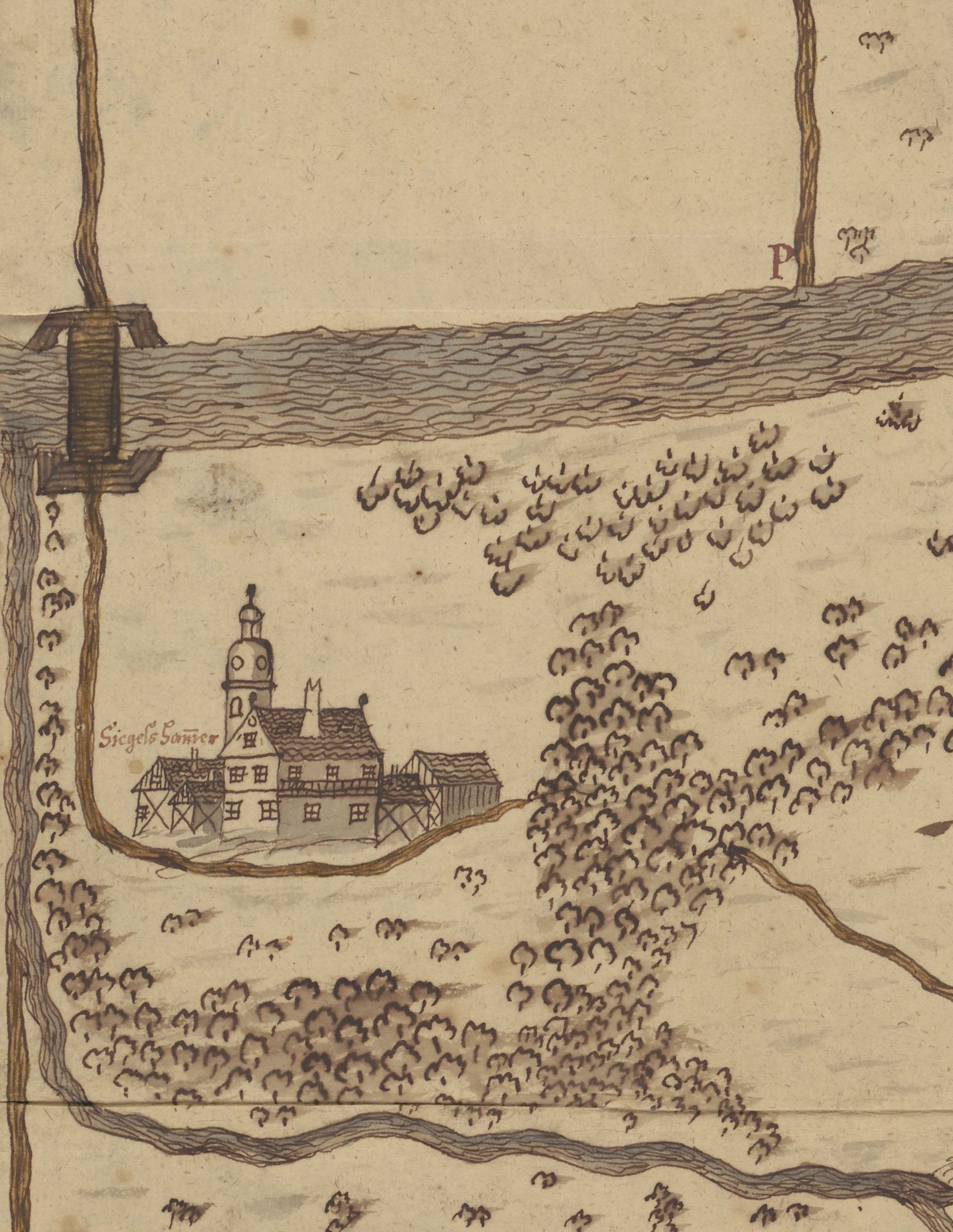 Schönheiderhammer im Erzgebirge: Ausschnitt aus einer undatierten Landkarte. Ob diese im 17. Jahrhundert oder im frühen 18. Jahrhundert entstand, ist nicht sicher. Der Eintrag „Siegels Hammer“ an der „Mulde“ macht es möglich, dass die Landkarte schon in der Zeit entstand, in die verschiedenen Träger des Namens Siegel das Hammerwerk besaßen (zwischen 1587 und 1707), s. Schönheiderhammer:Hammerherren und Gießereibesitzer bis 1900 und Jeremias Siegel sowie Heinrich Siegel (Hammerherr Schönheide).Hinweis: Die Landkarte ist gesüdet!